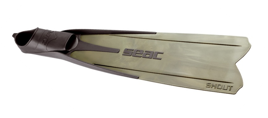 Ласта для фридайвинга